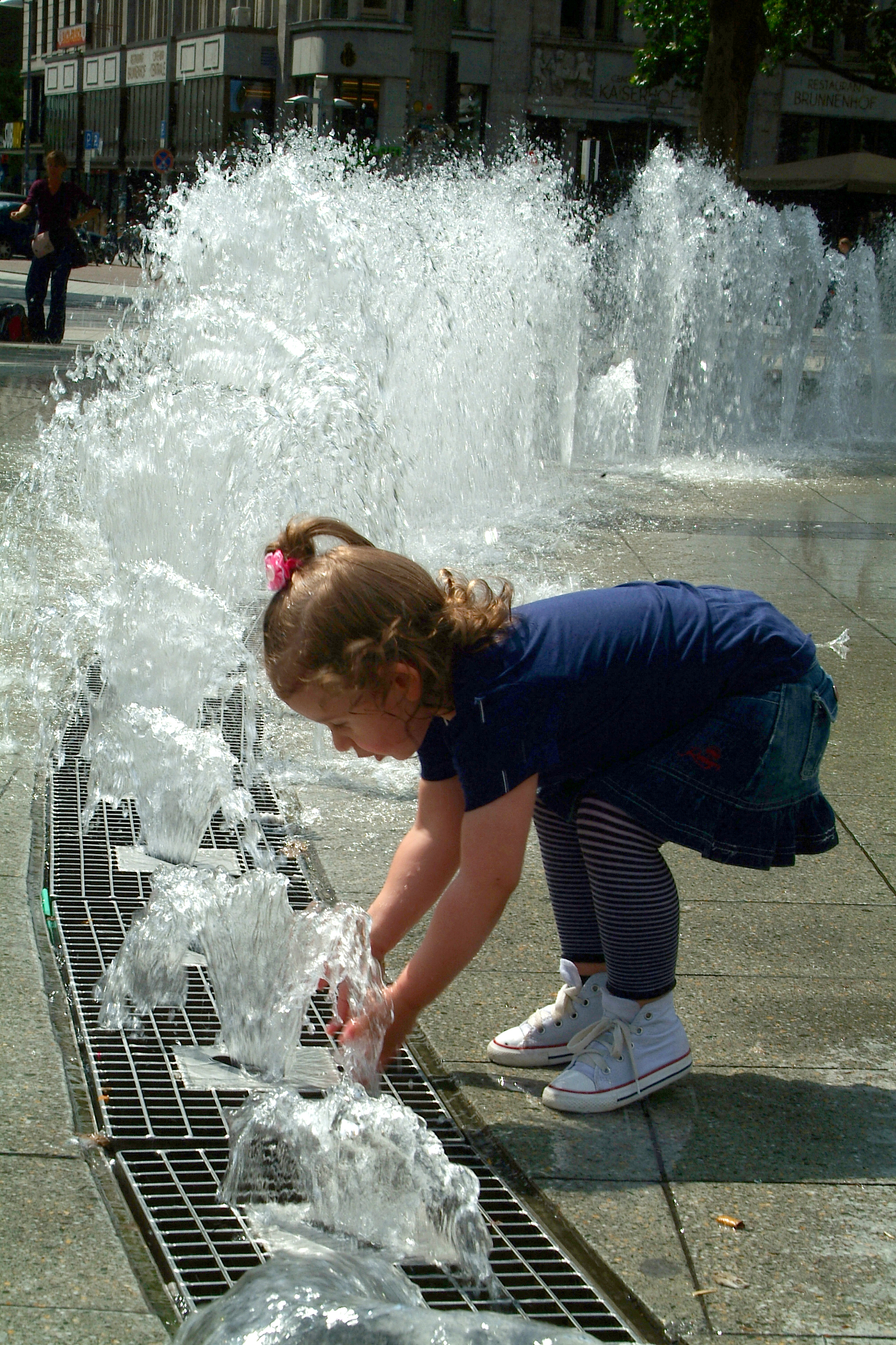 Der HAZ-Brunnen auf dem Ernst-August-Platz vor dem Hauptbahnhof Hannover besteht aus zwei sichelförmigen, ebenerdigen Brunnen vor den Parktaschen beiderseits des Ernst-August-Denkmals ...